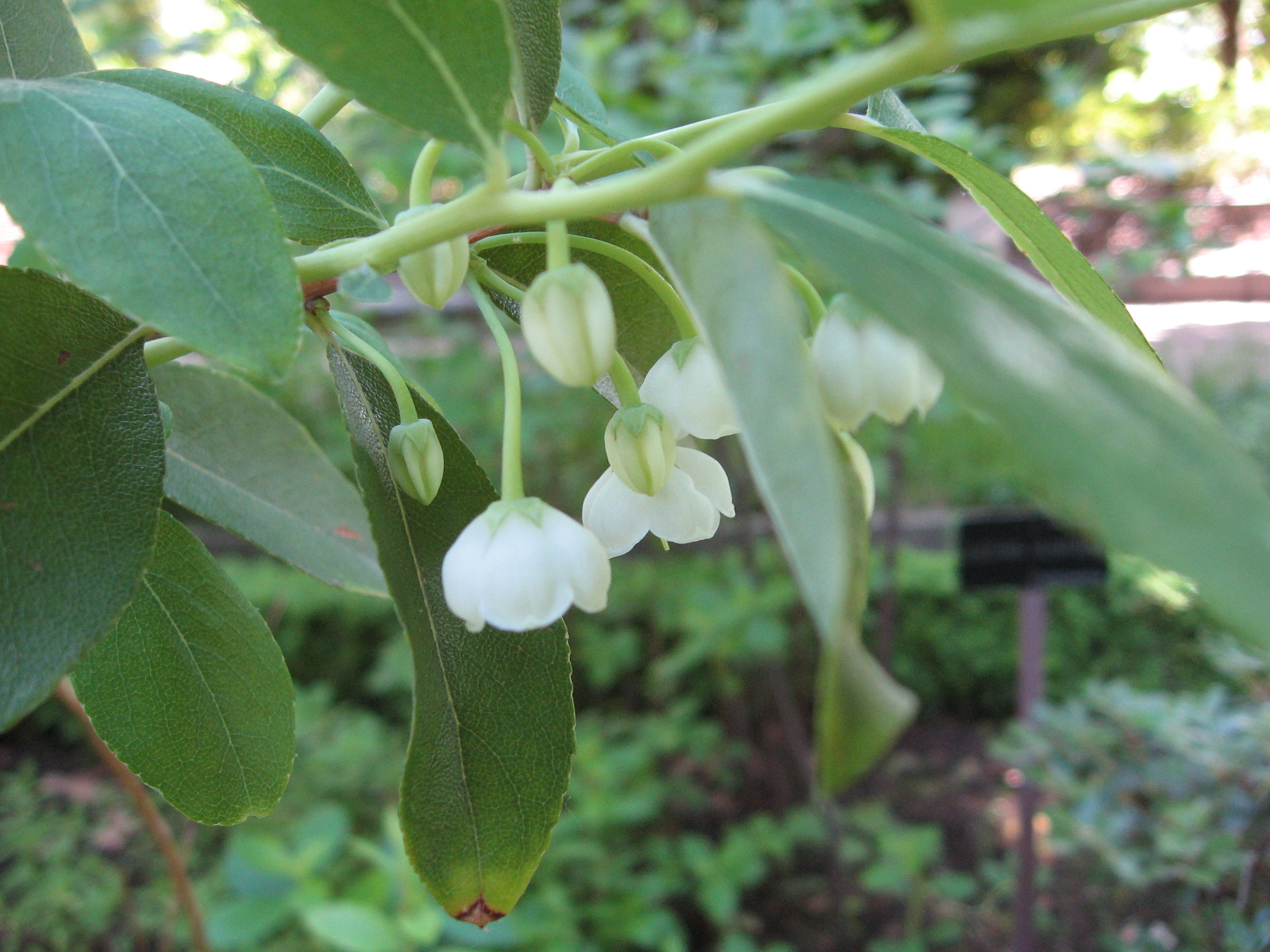 Zenobia pulverulenta. Real Jardín Botánico de Madrid.